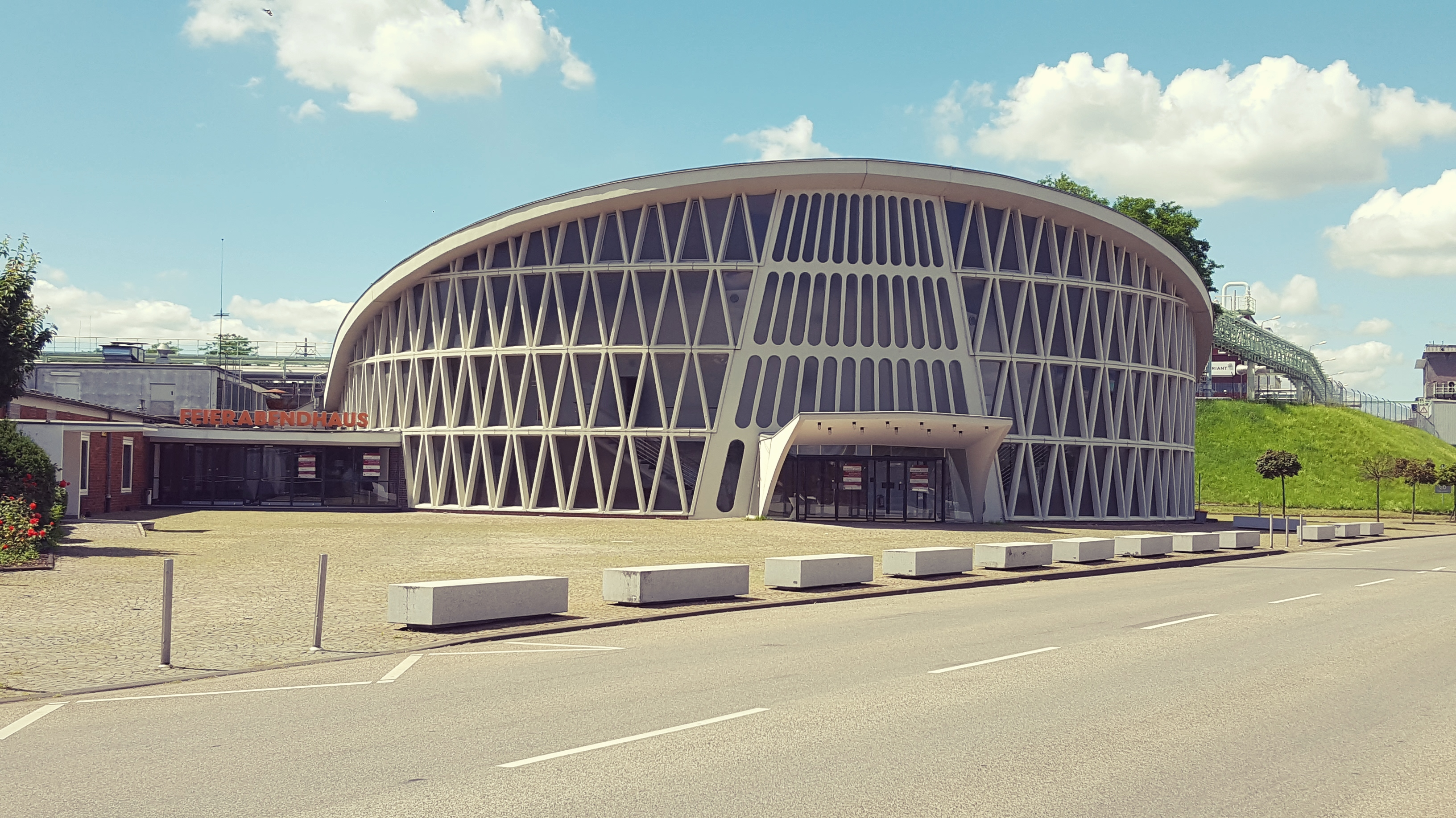 Feierabendhaus Knapsack, Außenansicht